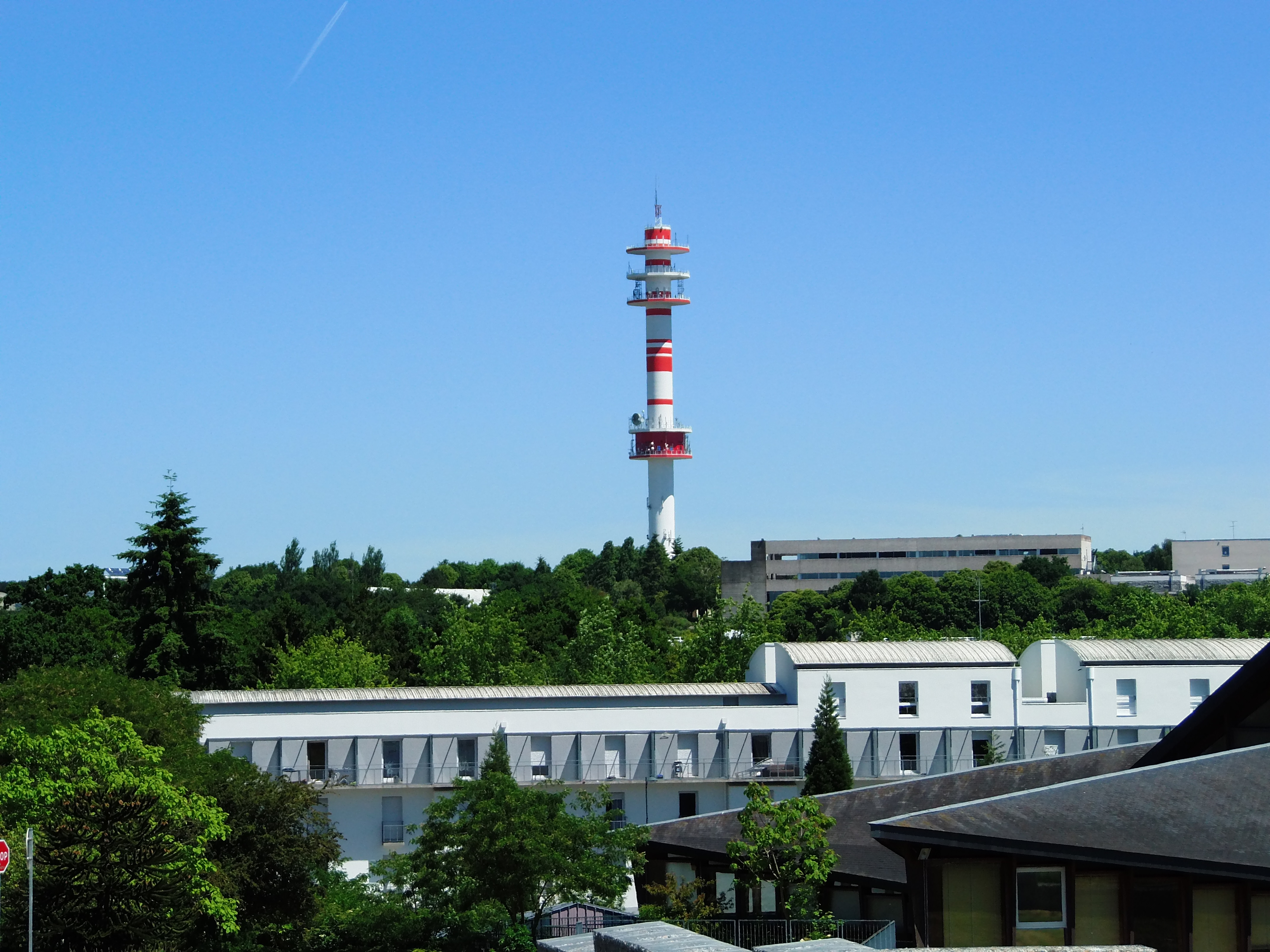 Vue sur la Tour TDF de Cesson-Sévigné vue depuis le campus universitaire de Beaulieu, Rennes